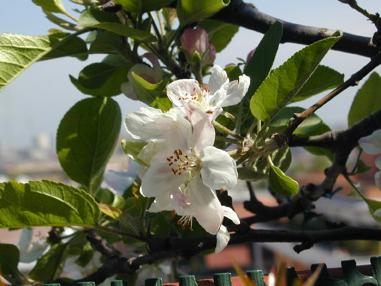 Fiori di Melo - Roma